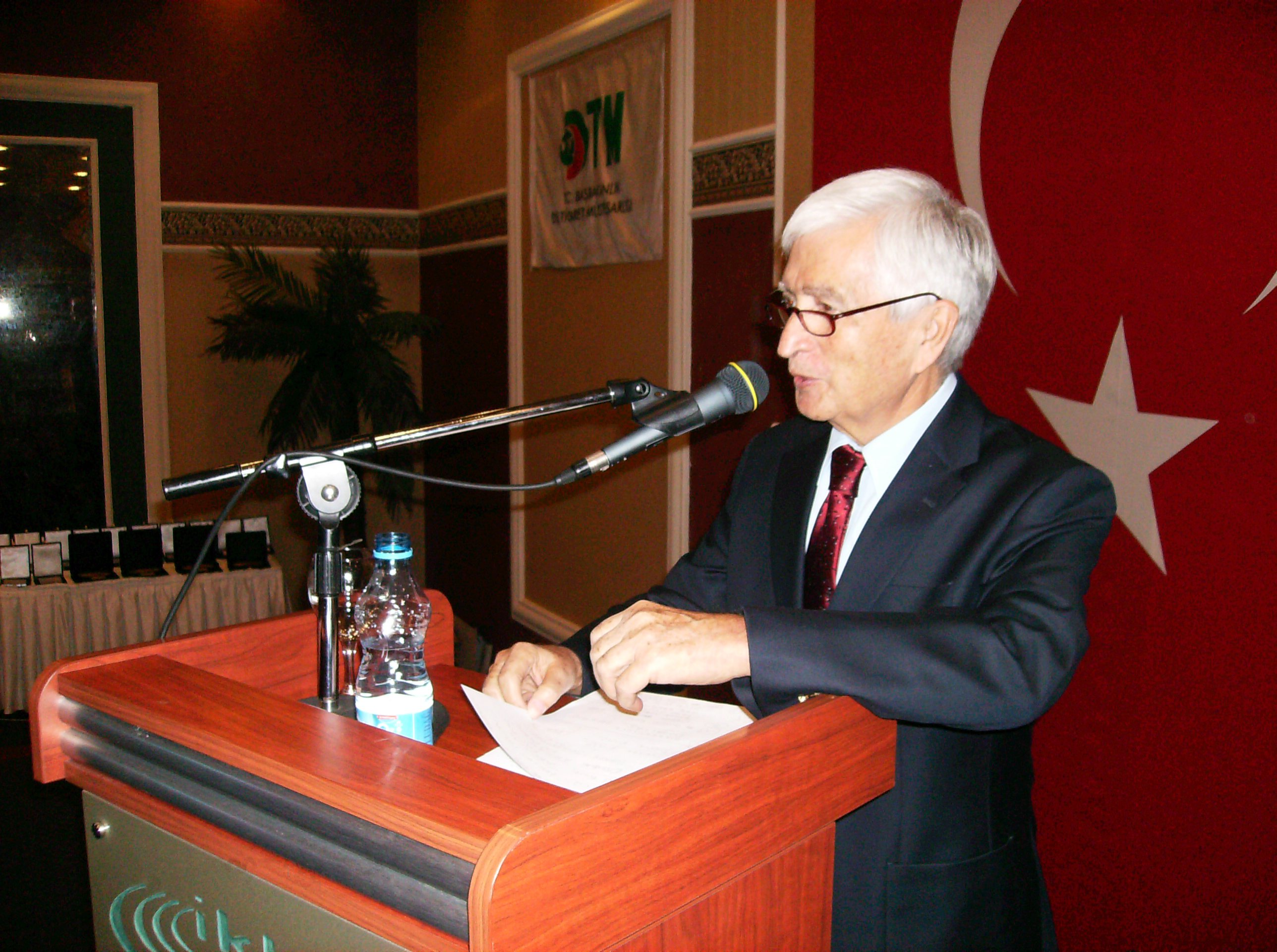 kendi çekimim